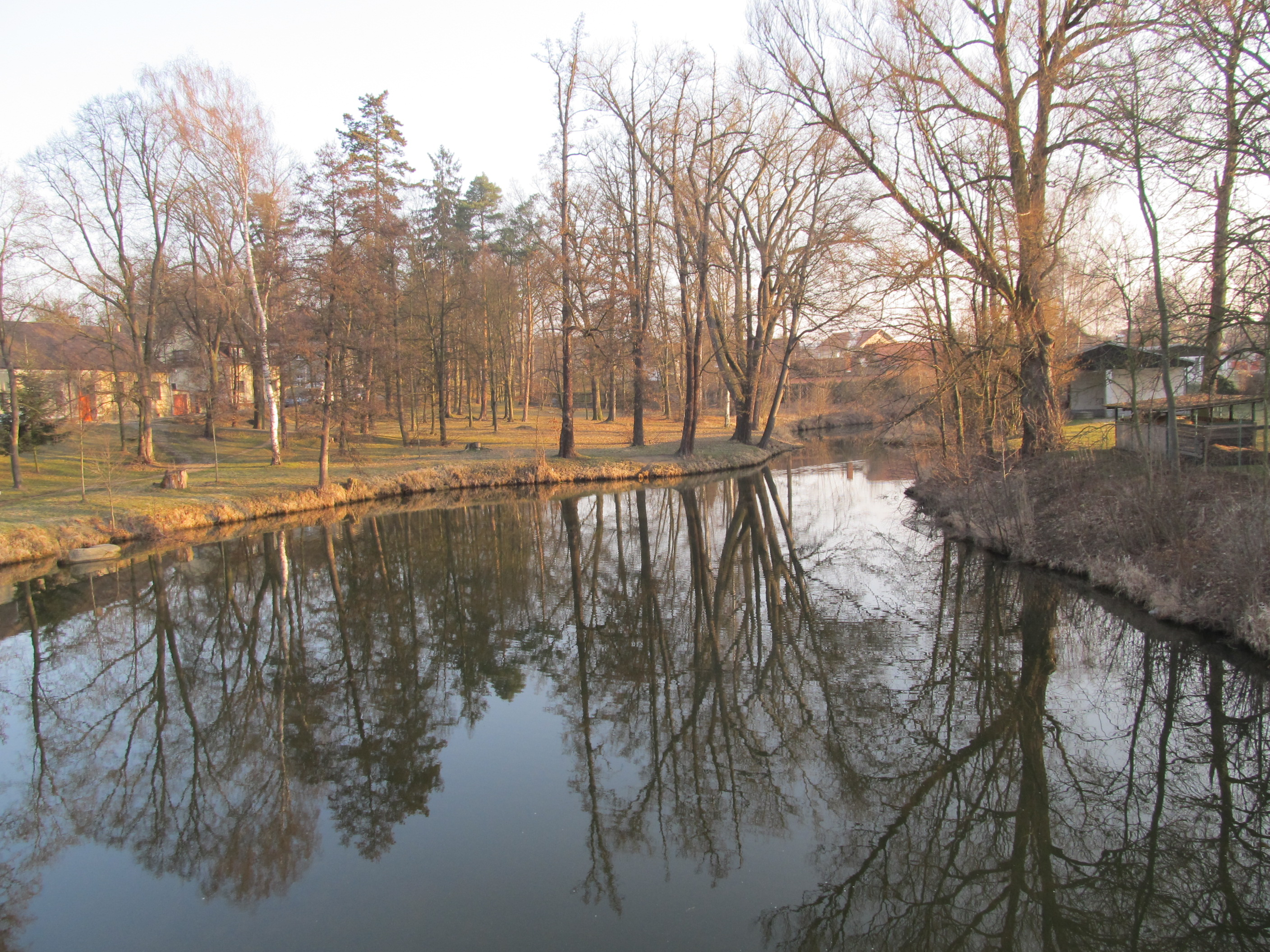 Závišínský potok mezi Pustým rybníkem a Lomnicí v Blatné